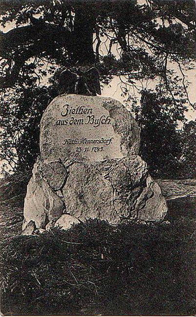 Gedenkstein für Hans Joachim von Zieten in der Schlacht bei Hennersdorf (23.11.1745).